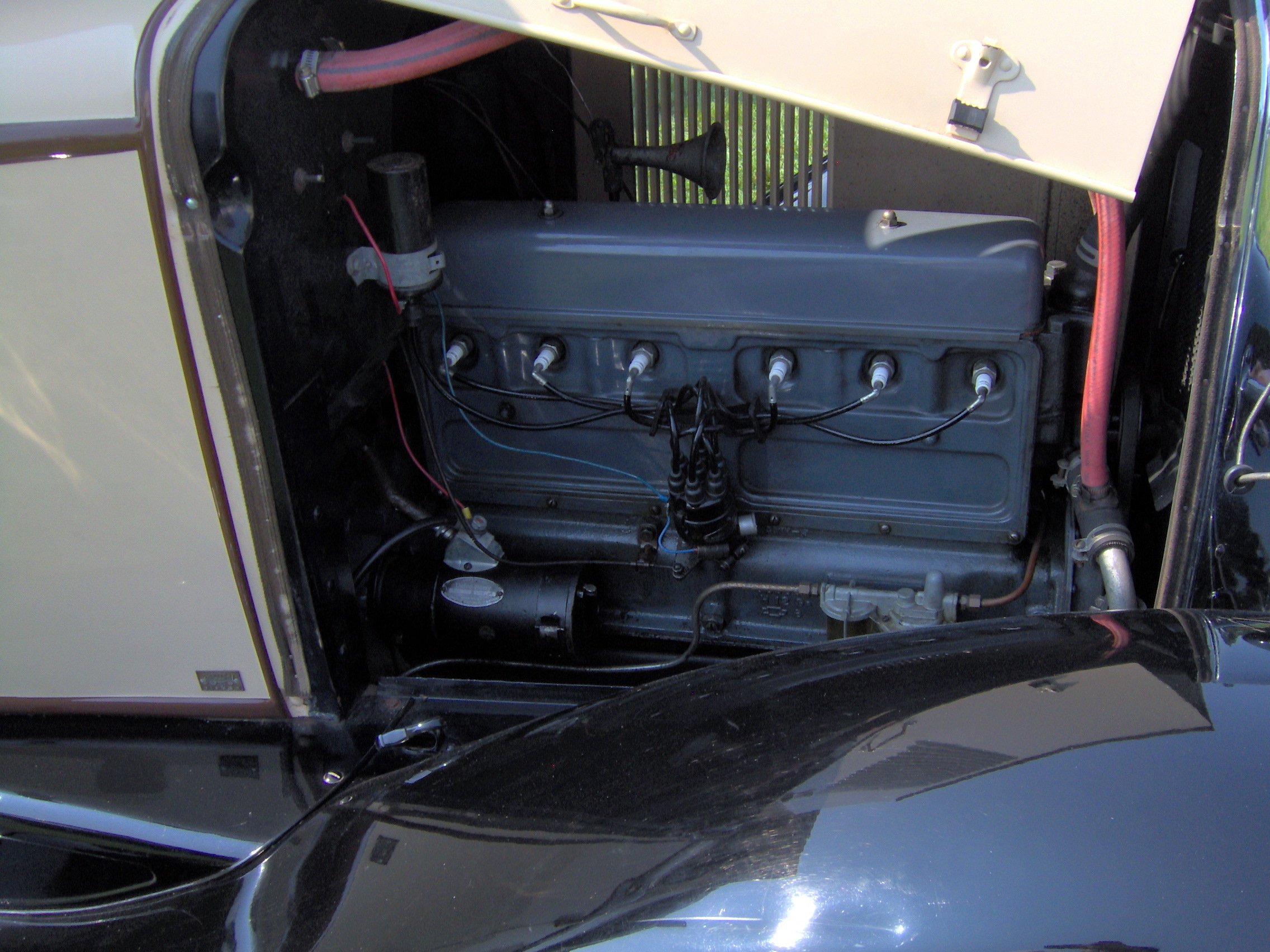 1929 Chevrolet 2-door sedan six-cylinder engine